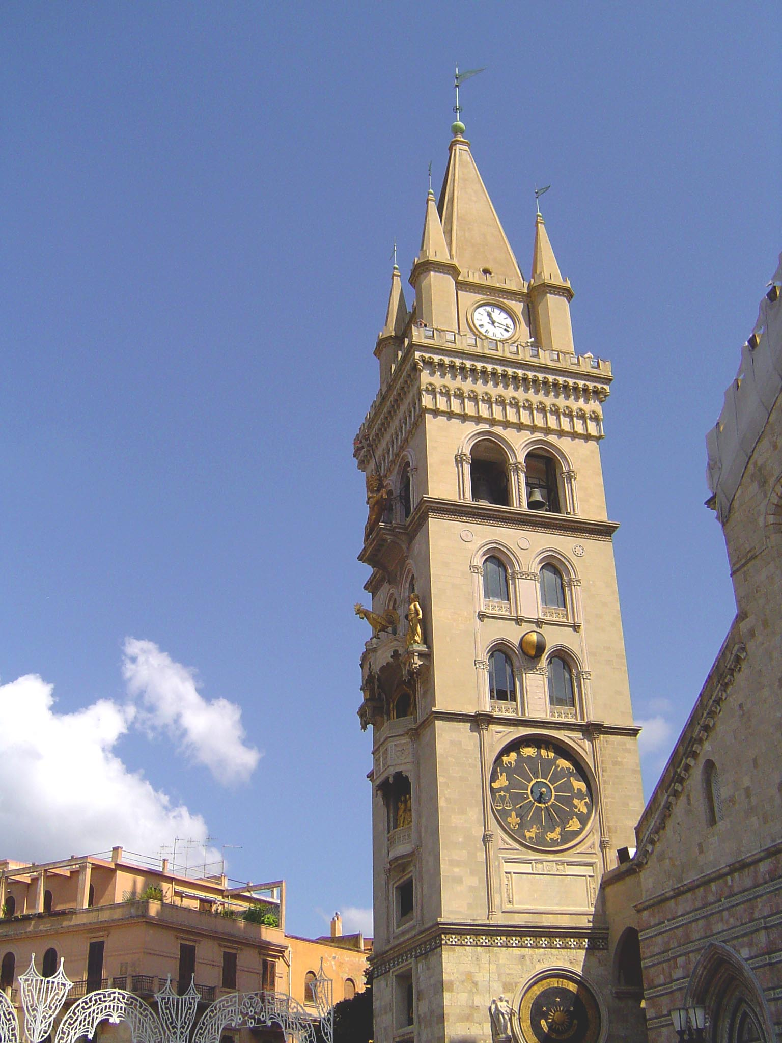 Kathedral vu Messina (2005)